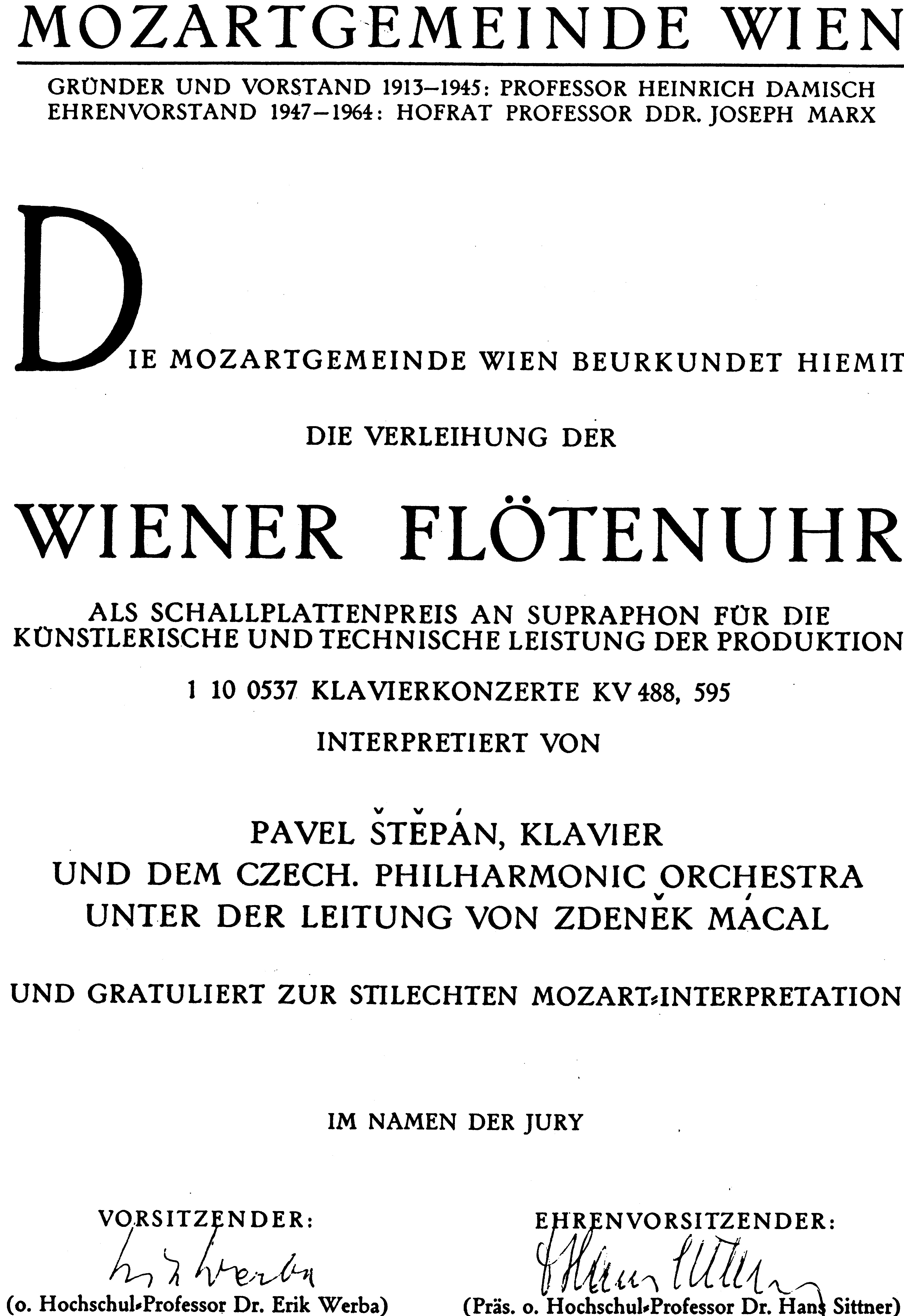 Wiener Flötenuhr Schallplattenpreis 1971 für Pavel Štěpán und die Tschechische Philharmonie mit Unterschriften des Erik Werba und Hans Sittner (en)